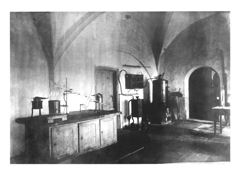 Chemielabor in der ehemaligen Schlossküche des Schlosses Hohentübingen